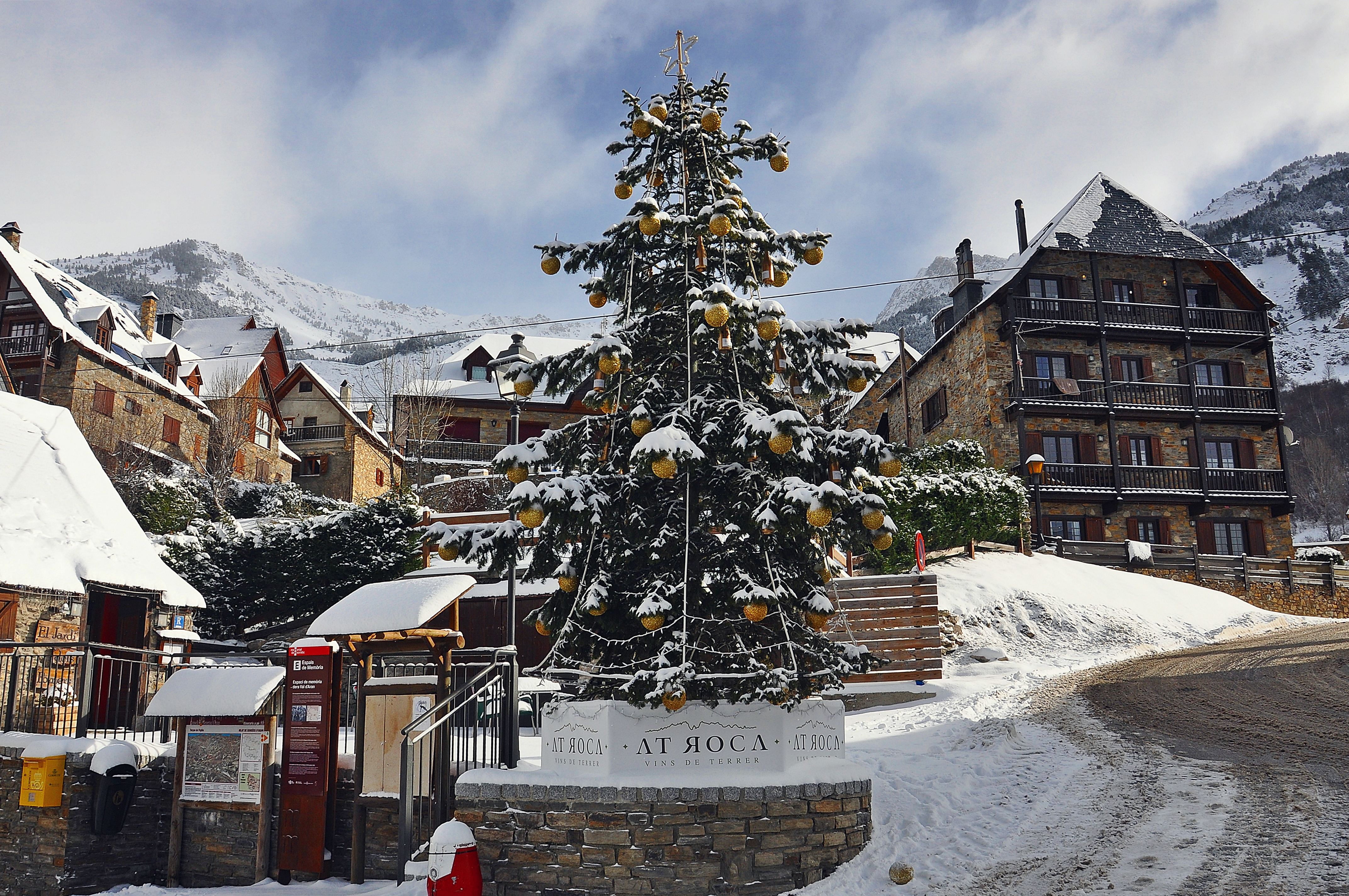 Valle de Aran-2016